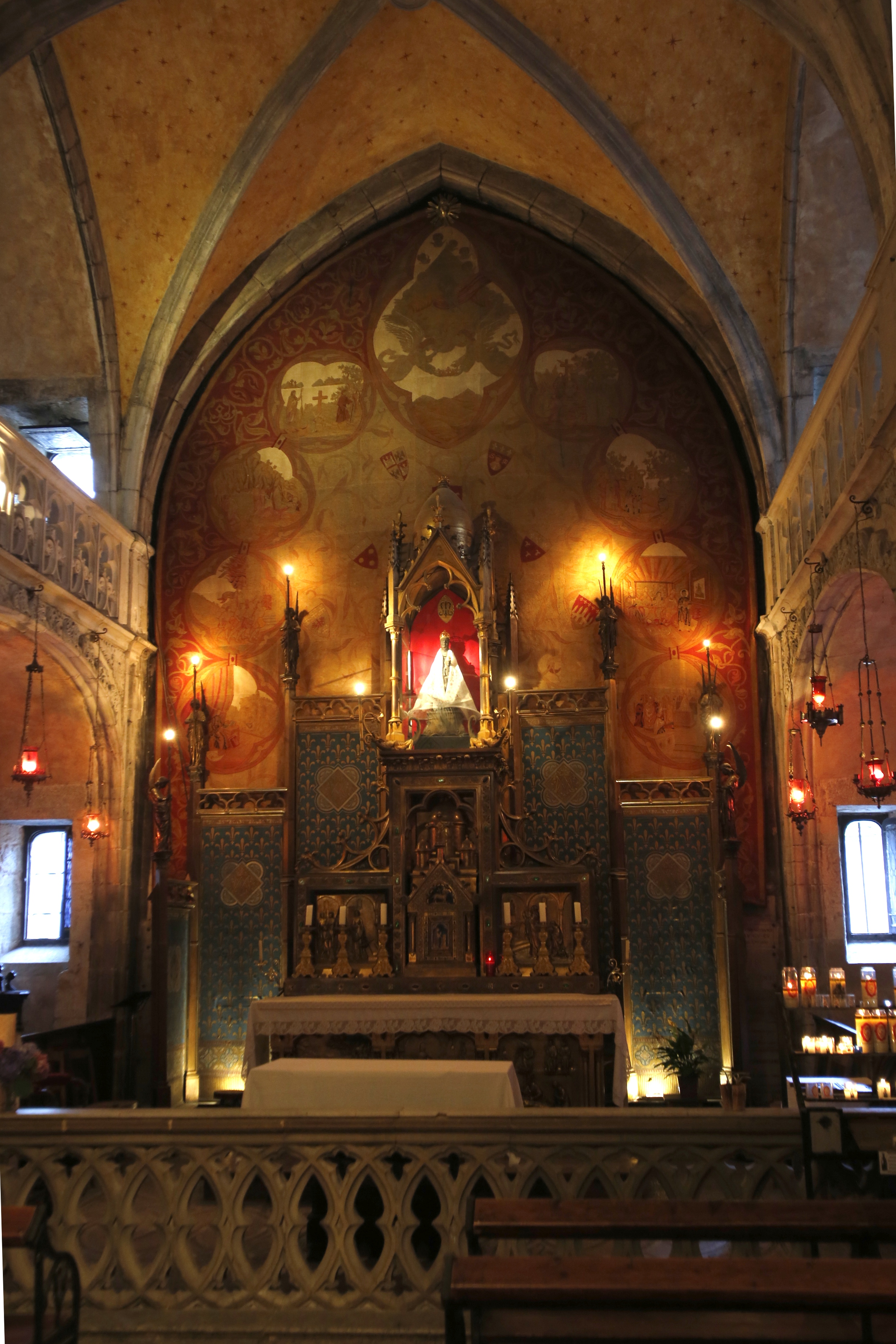 Chapelle Notre-Dame de Rocamadour. .